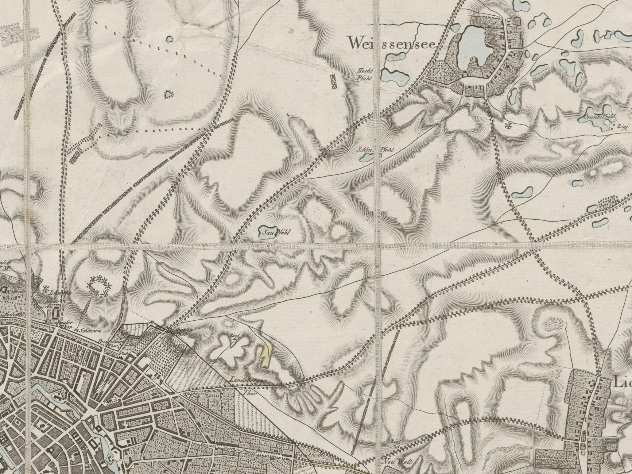 Der Titel steht 9-zeilig oben rechts in einem Rahmen zusammen mit einer Maßstabsleiste über 2500 Schritt. Im Plan rechts oben (neben Heinersdorf) ein Orientierungskreuz. Der Plan reicht westlich von Grunewald bis östlich nach Friedrichsfelde und südlich von Steglitz bis nördlich nach Malchow.